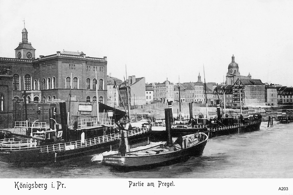 Partie am Pregel, mit Löbenicher Kirche und Probsteikirche in Königsberg